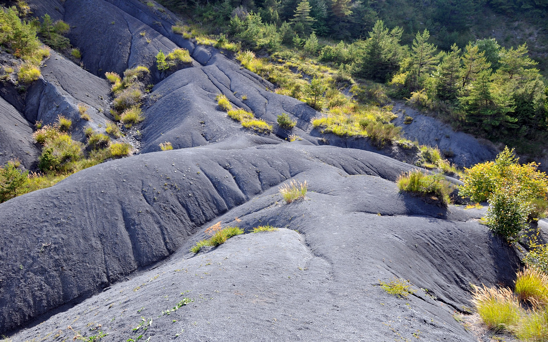 Robines col de la Chaudière (département de la Drôme)